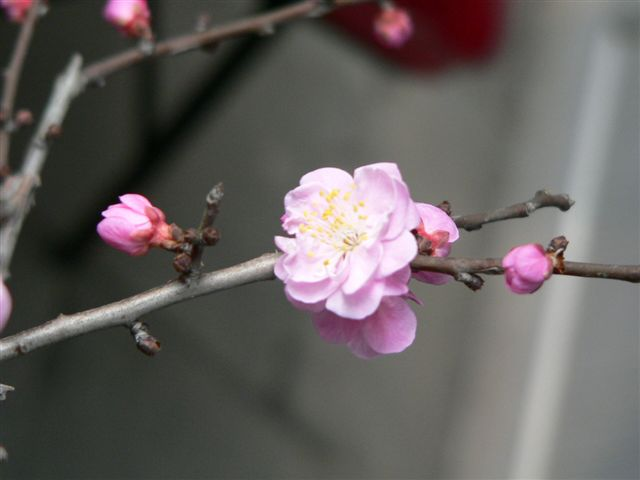 梅花，2005年2月6日拍摄于北京北海公园团城梅花精品展。